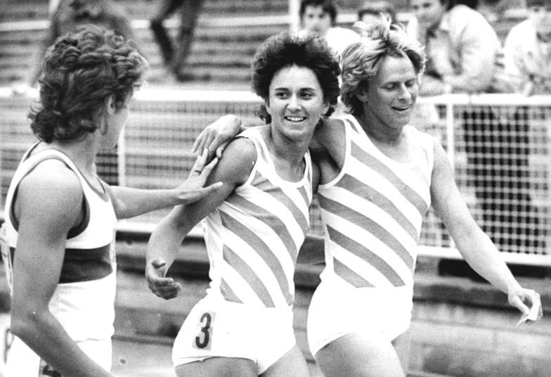 Marlies Göhr, Silke Gladisch, Ingrid Auerswald ADN-ZB Thieme 6.8.85 Dresden: Vorschaumotiv 36. DDR-Meisterschaften in der Leichtathletik vom 9. bis 11. August 1985 - Im Leipziger Zentralstadion strebt die 27jährige Olympiasiegerin von Moskau (Staffel) und zweifache Weltmeisterin von 1983, Marlies Göhr (SC Motor Jena- Foto vom Goldenen Oval 1985 in Dresden- Bildmitte), bereits ihren neunten Titelgewinn hintereinander an. Zu ihren schärfsten Konkurentinnen gehören erneut Silke Gladisch (SC Empor Rostock- links) und Ingrid Auerswald (SC Motor Jena- rechts).